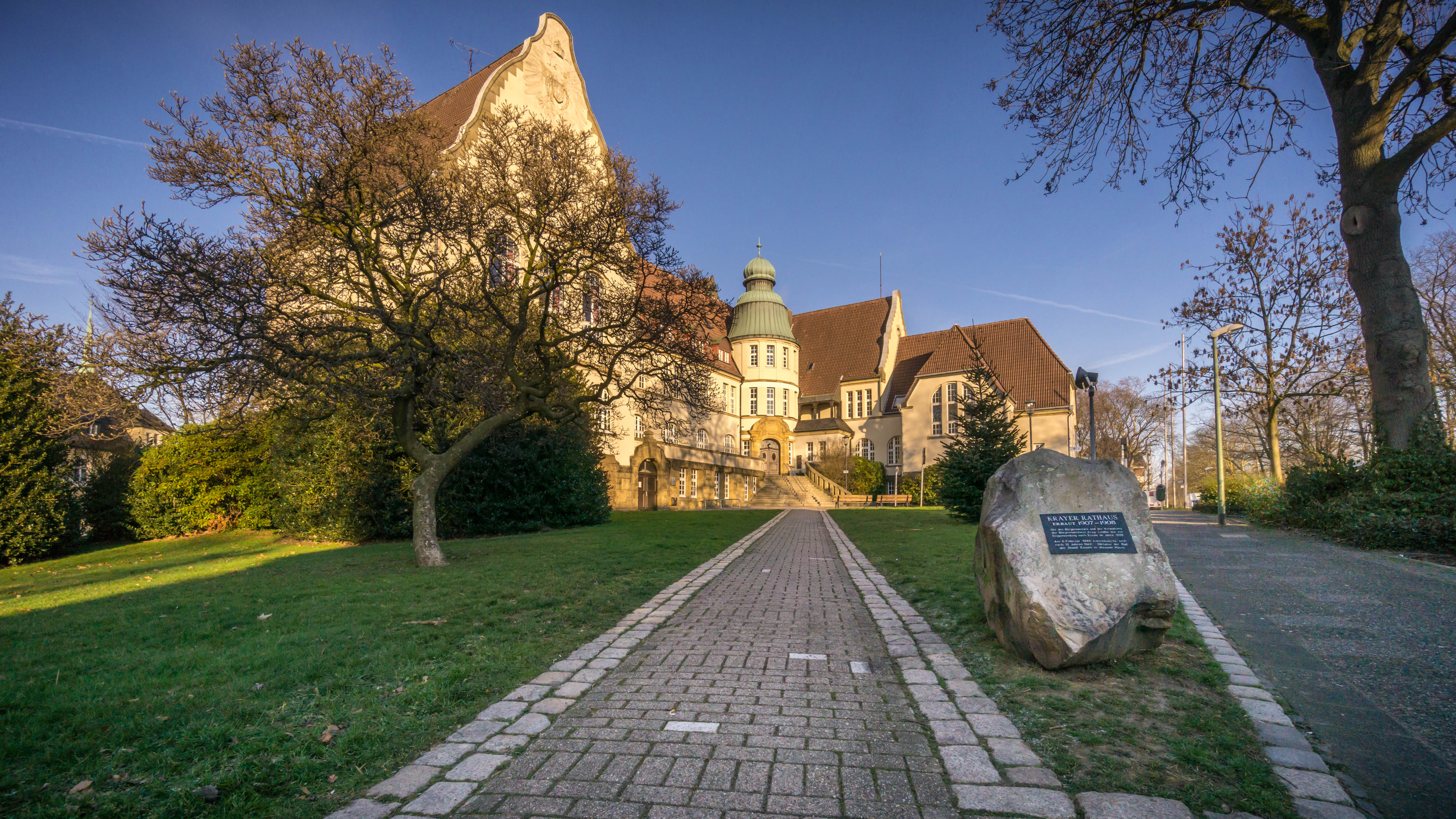 Totalansicht vom Krayer Rathaus